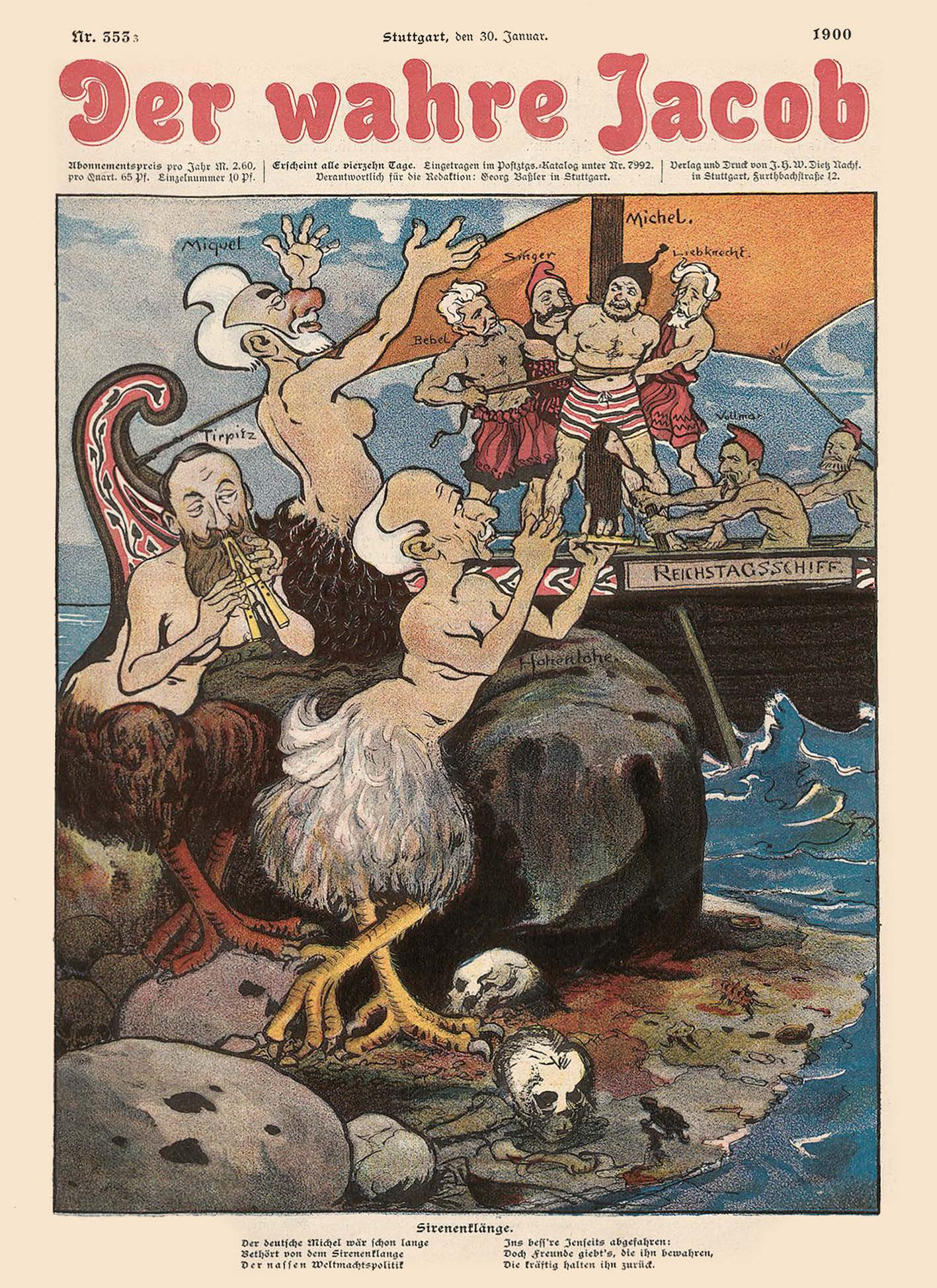 Titelseite der Zeitschrift / Title page of the periodical